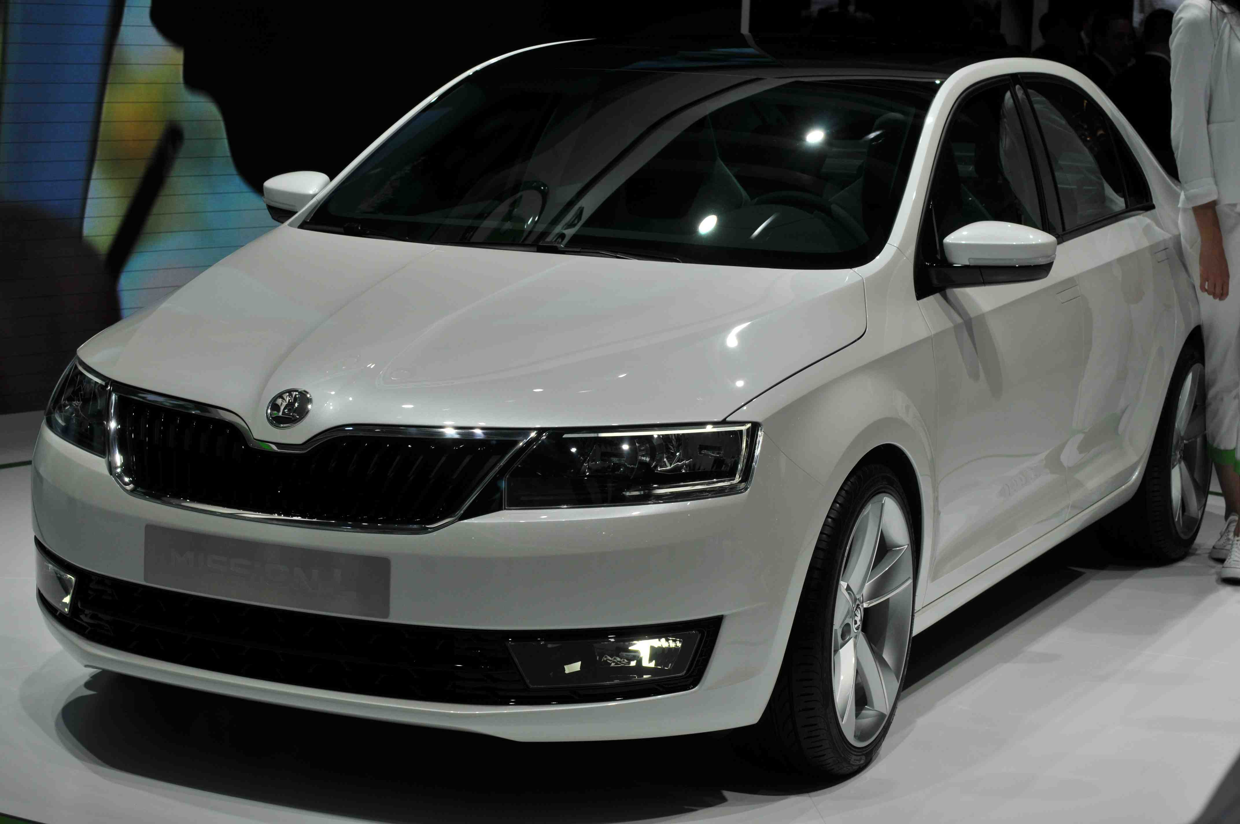 IAA 2011 - Internationale Automobilausstellung in Frankfurt/Main